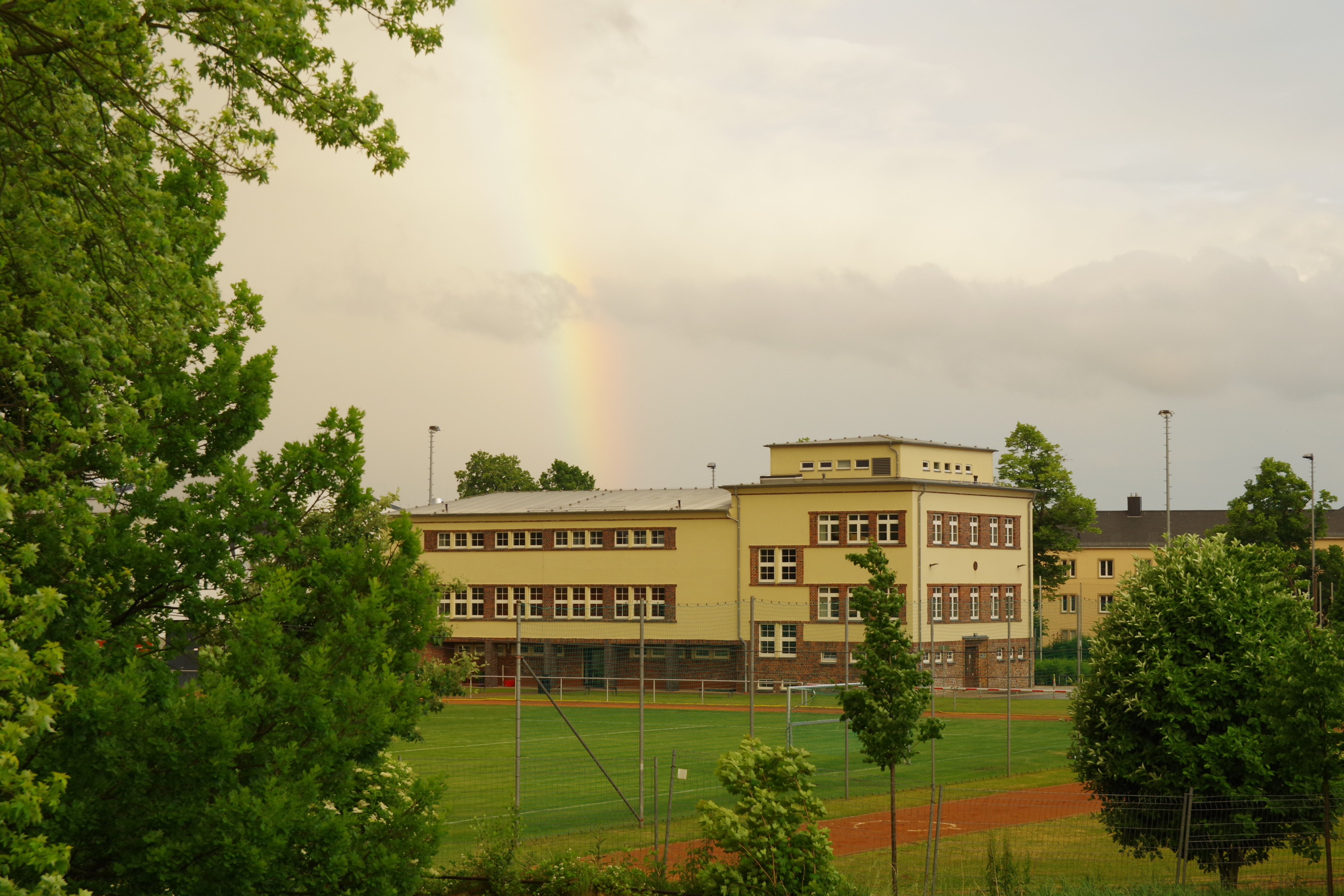 Turnhalle Jahnbaude, Fürstenstraße 85 Chemnitz